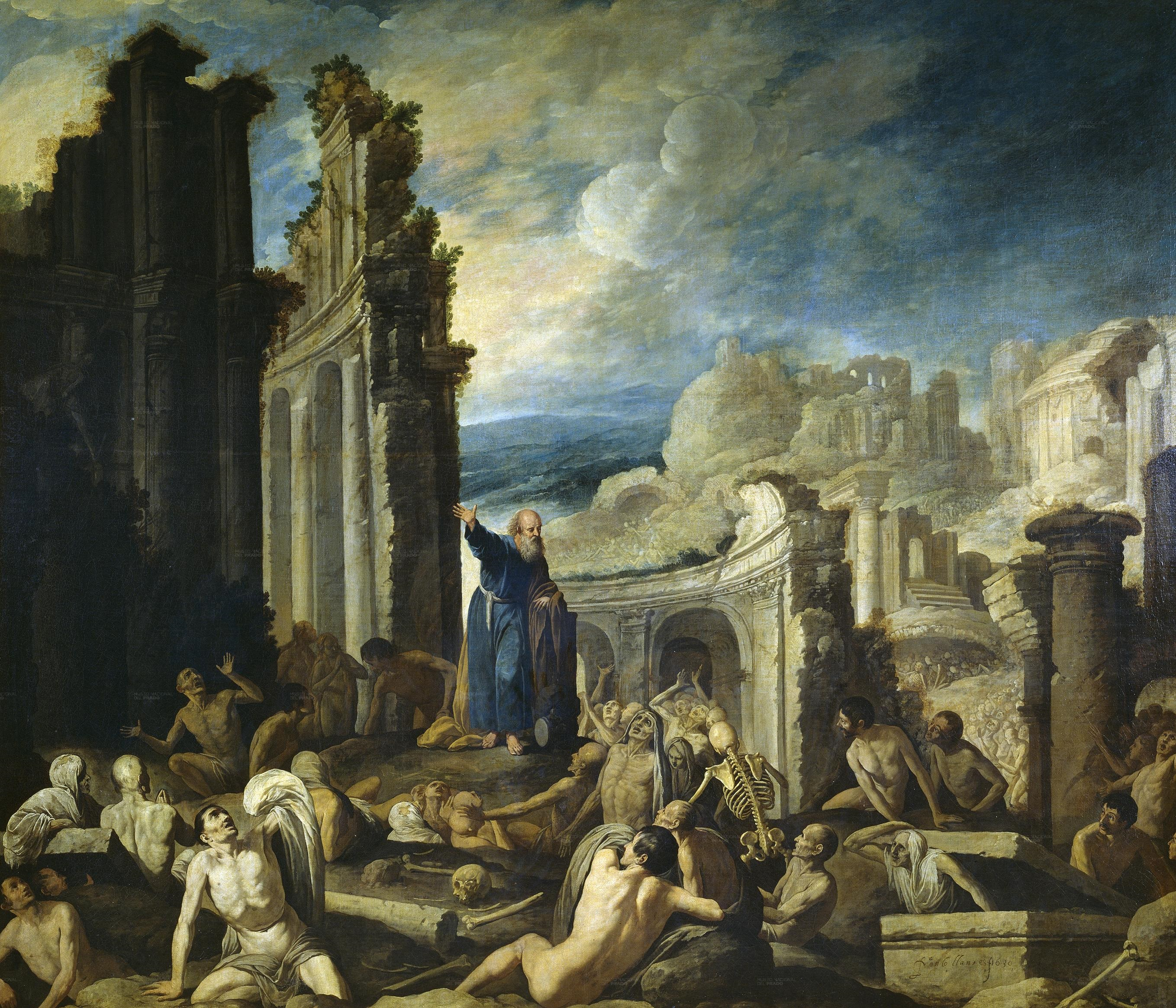 La obra representa una de las visiones que tuvo el profeta Ezequiel, según se recoge en el Antiguo Testamento.